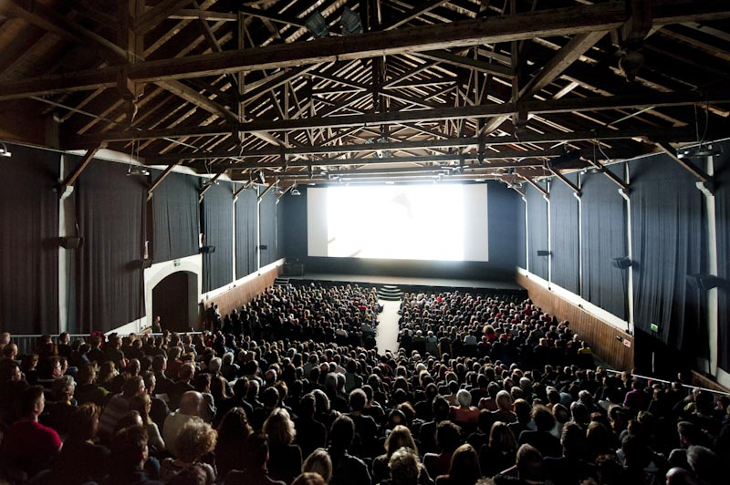 Reithalle roter Teppich